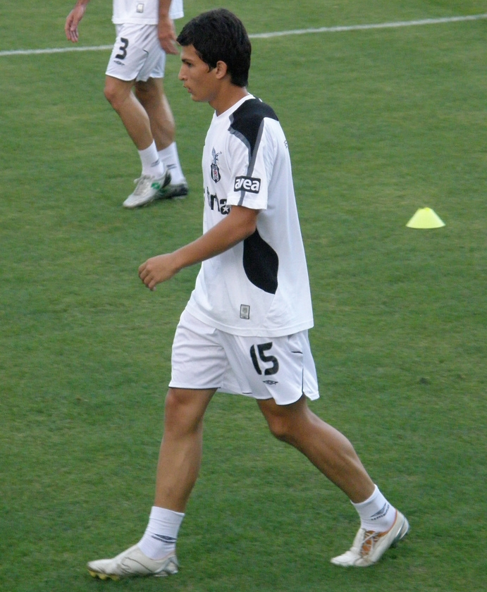 16 ağustos 2008 Beşiktaş Hazar L. maçında çekilmiştir